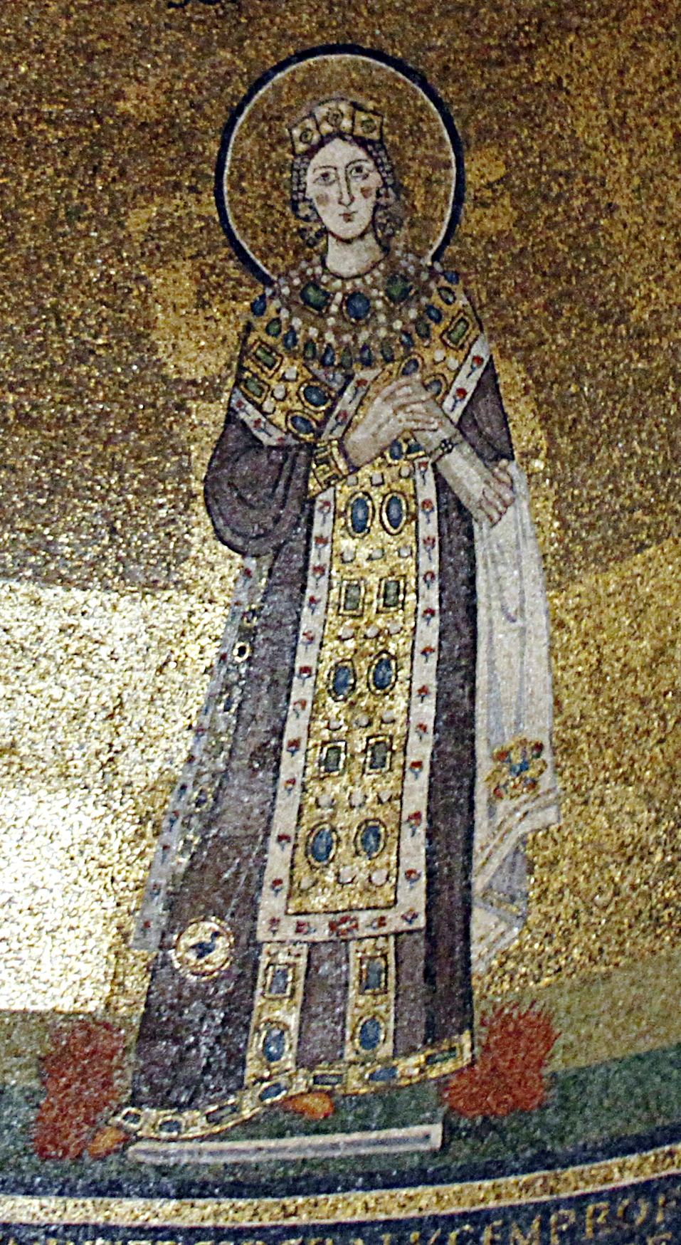 Sant'Agnese fuori le mura - Rome